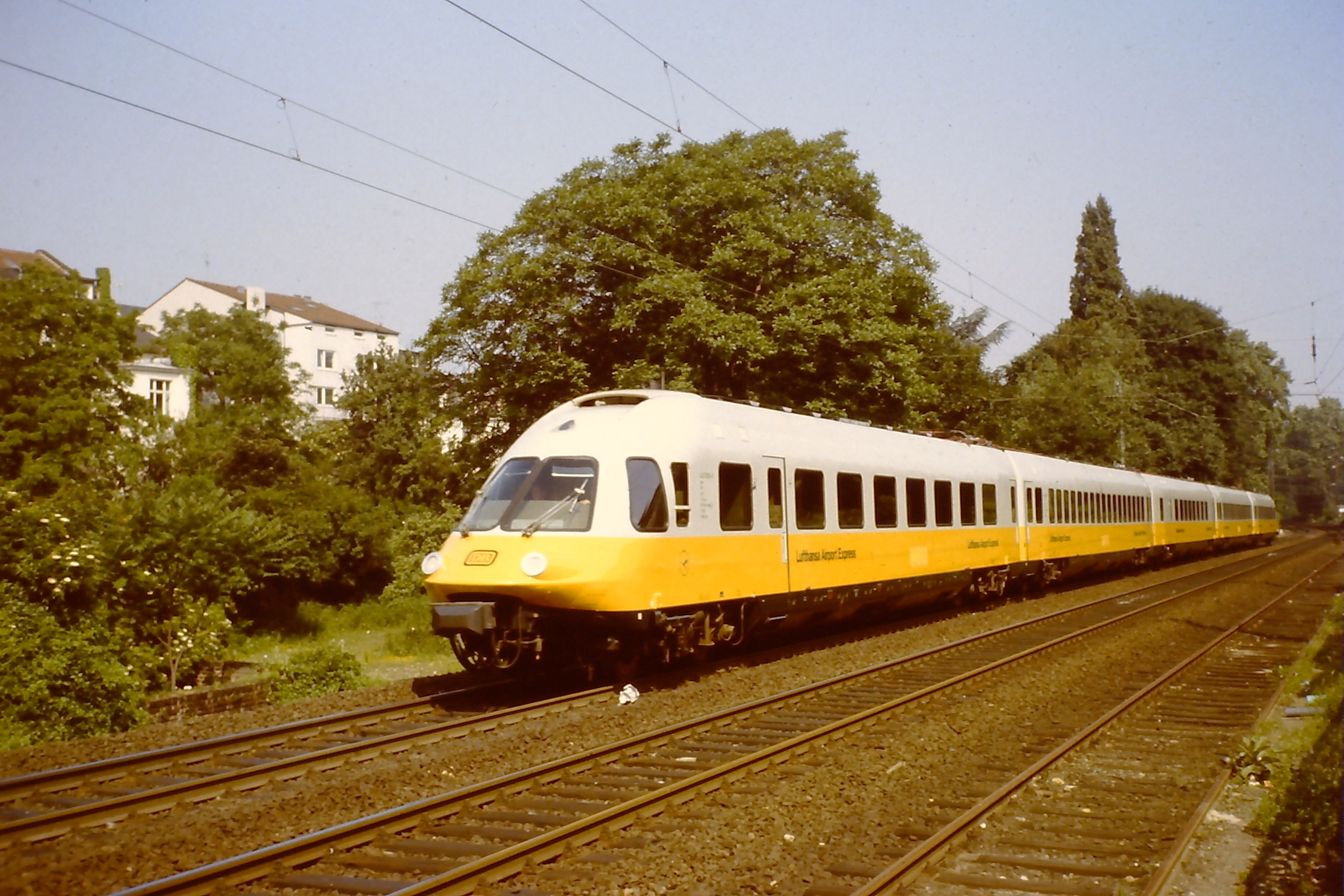 Lufthansa Airport Express bei der Fahrt durch Bonn